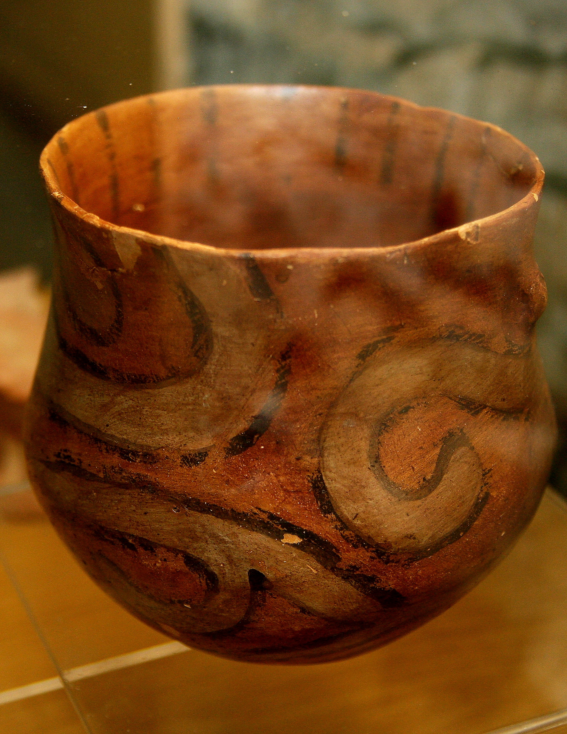 vas de cucuteni in Muzeul din satul cu nume omonim.